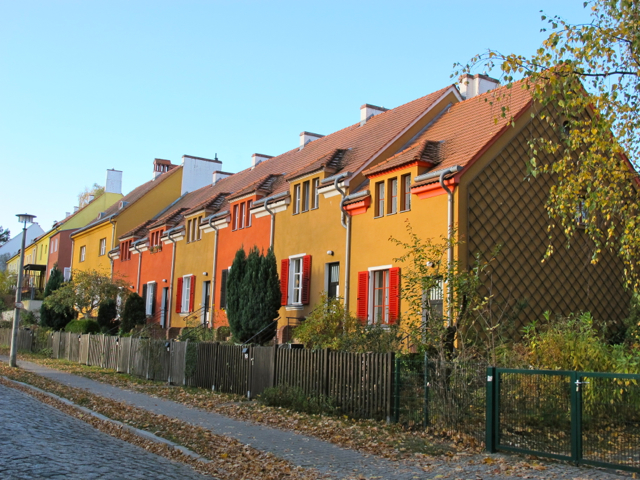 Gartenstadt Falkenberg "Tuschkastensiedlung" Oktober 2012